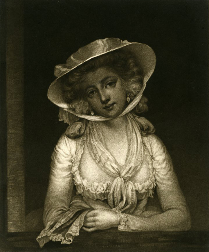 Gravure en taille-douce selon le procédé mezzotinto (ou manière noire) d'après un portrait à l'huile de Lady Cunliffe par John Hoppner, la représentant comme Sophia Western, l'héroïne du roman à succès de Fielding "Tom Jones", paru en 1749. Cette gravure monochrome représente une jolie jeune femme rêveuse et élégante, appuyée à une fenêtre, bras croisés sur l'appui, tête penchée à gauche, longues boucles blond cendré ou poudrées, robe claire à manches longues au grand décolleté bordé de dentelle, longue écharpe en fin tissu négligemment nouée dans l'échancrure, un pan tenu dans la main gauche, large chapeau retenu par un ruban passant sous le menton.